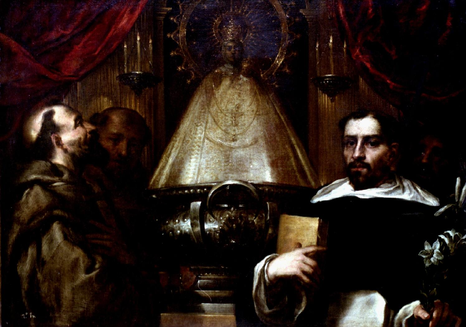 La imagen de la Virgen de Atocha se representa en su altar flanqueada por dos cortinajes rojos y dos lampadarios a ambos lados, tal como la muestran las estampas devotas de su tiempo y los muchos lienzos que la copiaron con fidelidad. Y ante la imagen de la Virgen y adorándola aparecen San Francisco de Asís, el fundador de la Orden de los franciscanos, y Santo Domingo de Guzmán, el fundador de la Orden de los dominicos.